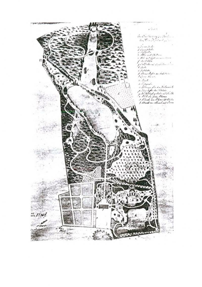 Plan Parku Oruńskiego